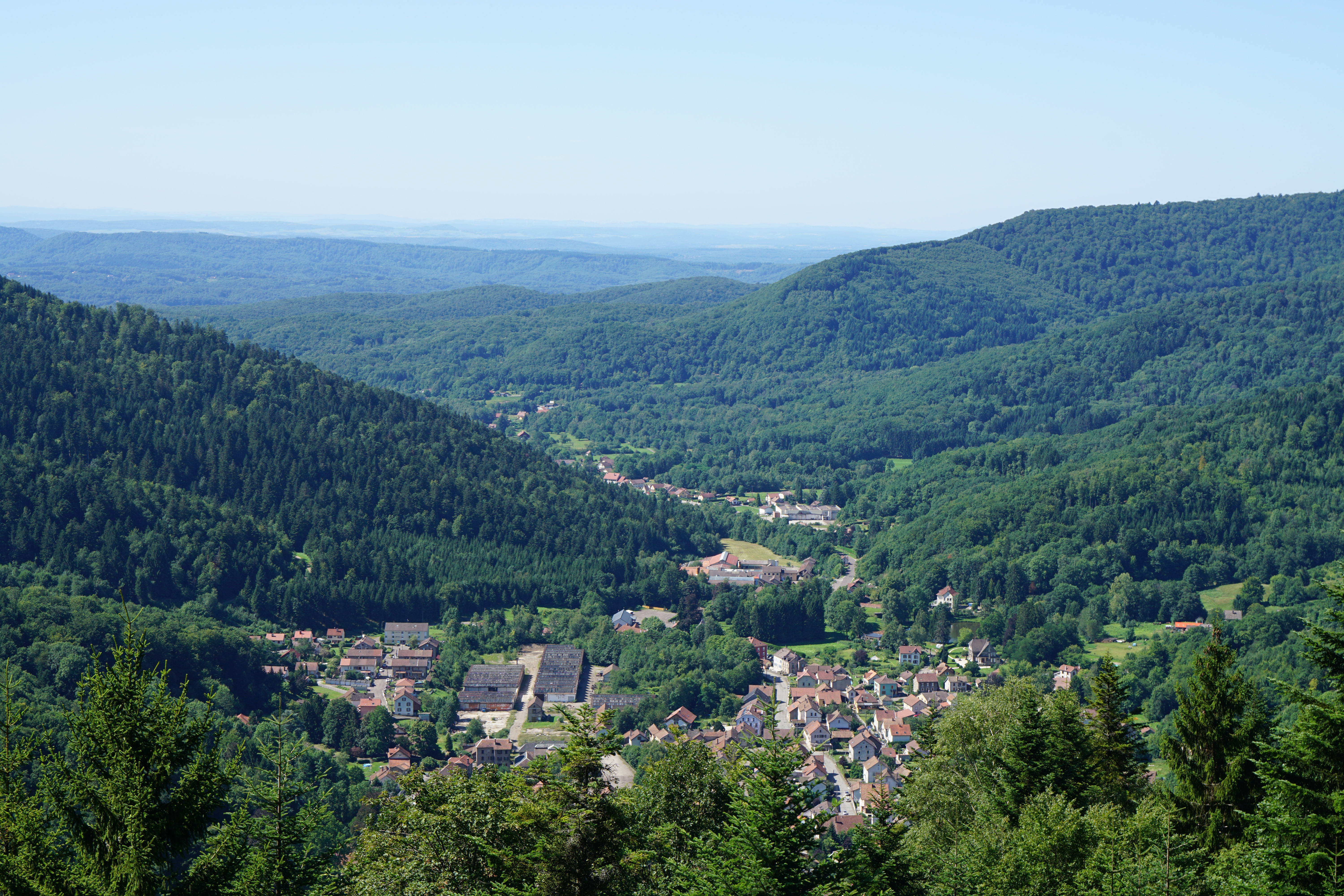 Vue générale de Plancher-les-Mines depuis la Croix du Choléra.